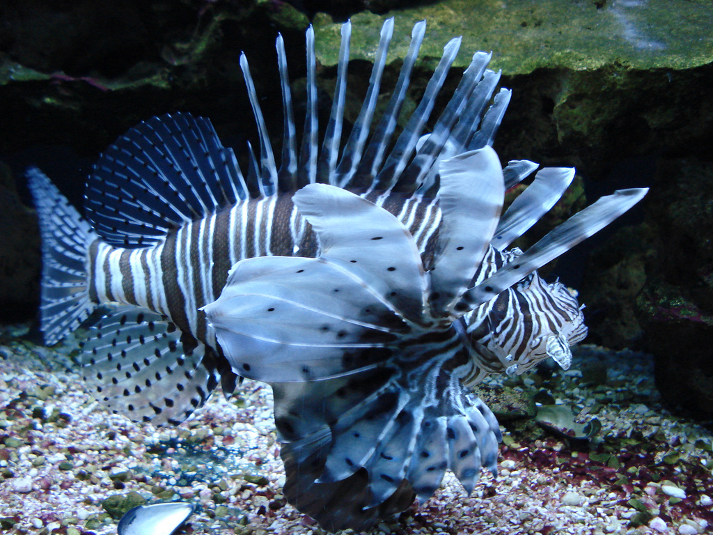 Indischer Rotfeuerfisch